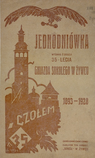 Jednodniówka wydana z okazji 35 lecia gniazda Sokolego w Żywcu 1893-1928.